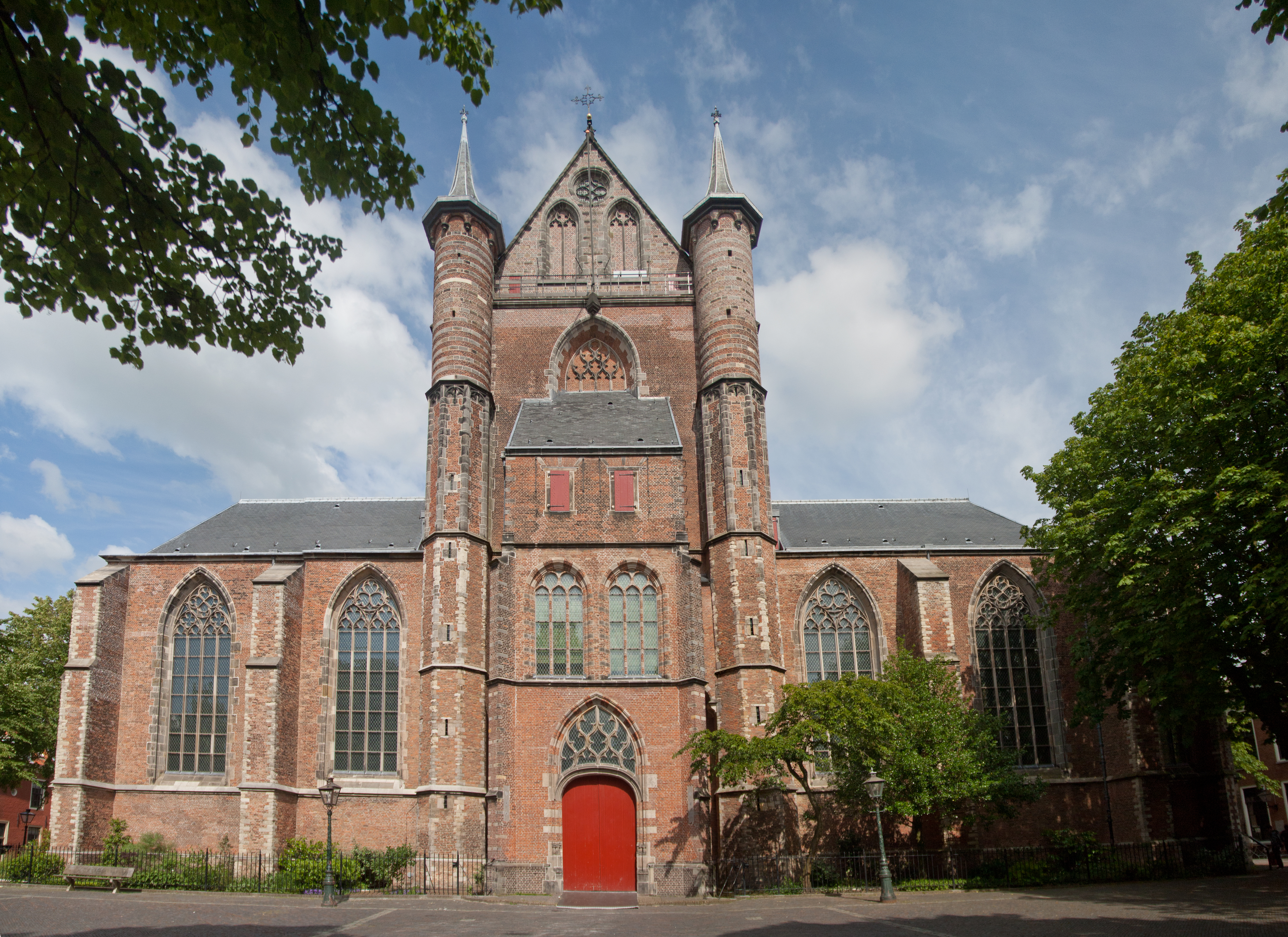 Westzijde van de Pieterskerk te Leiden